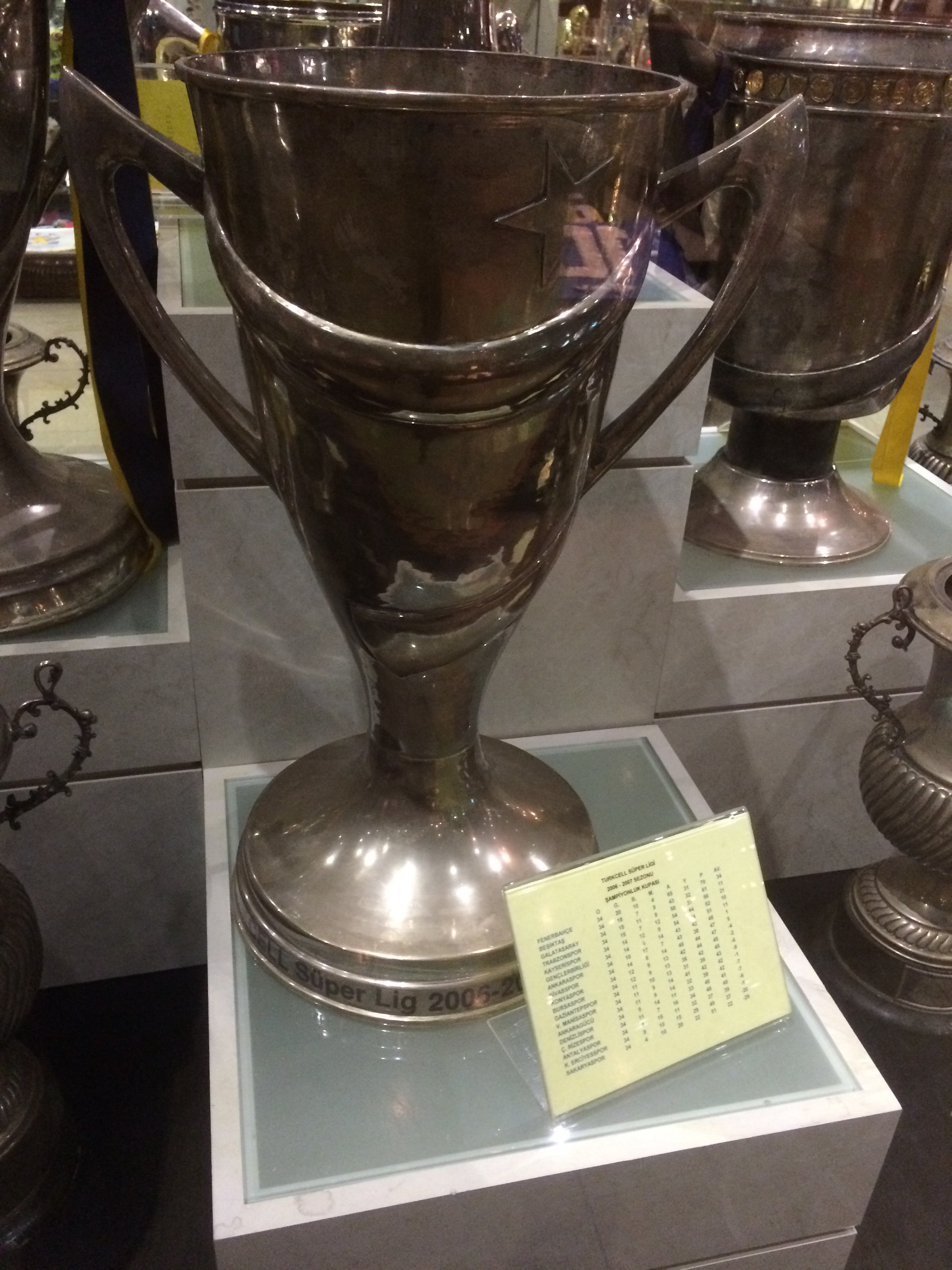 2006–07 Süper Lig Cup